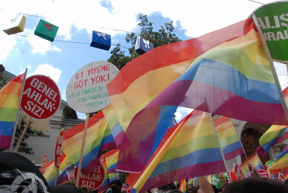 XXII. İstanbul Onur Haftası etkinlikleri kapsamında geleneksel olarak yapılan İstanbul Onur Yürüyüşü'nden görünüm, 2014.